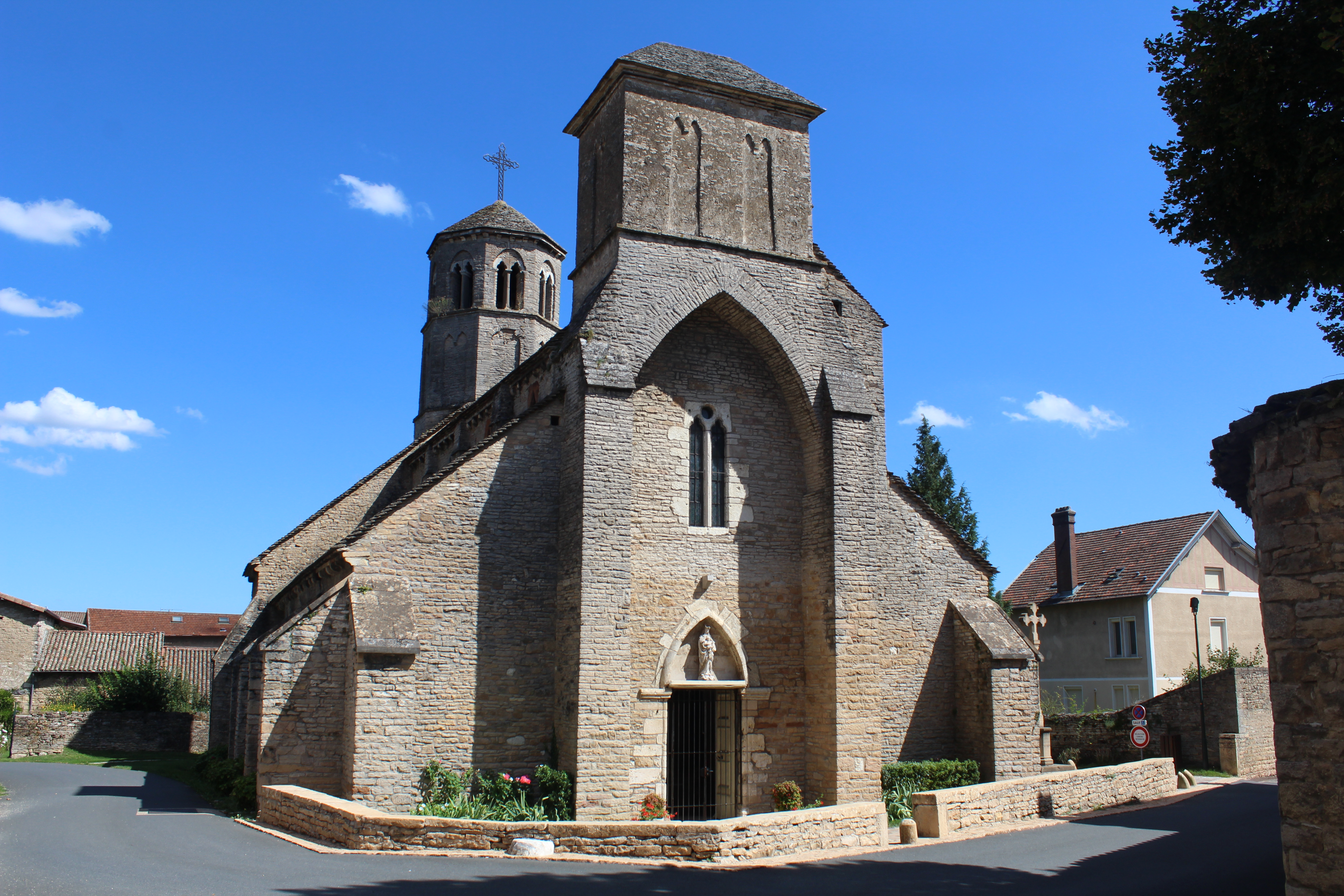 Église Saint-Albain de Saint-Albain.